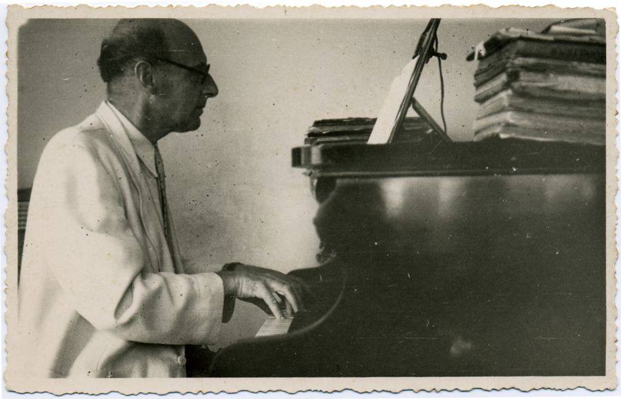 פאול בן-חיים (מס' קטלוגי: MUS 055 / M19)